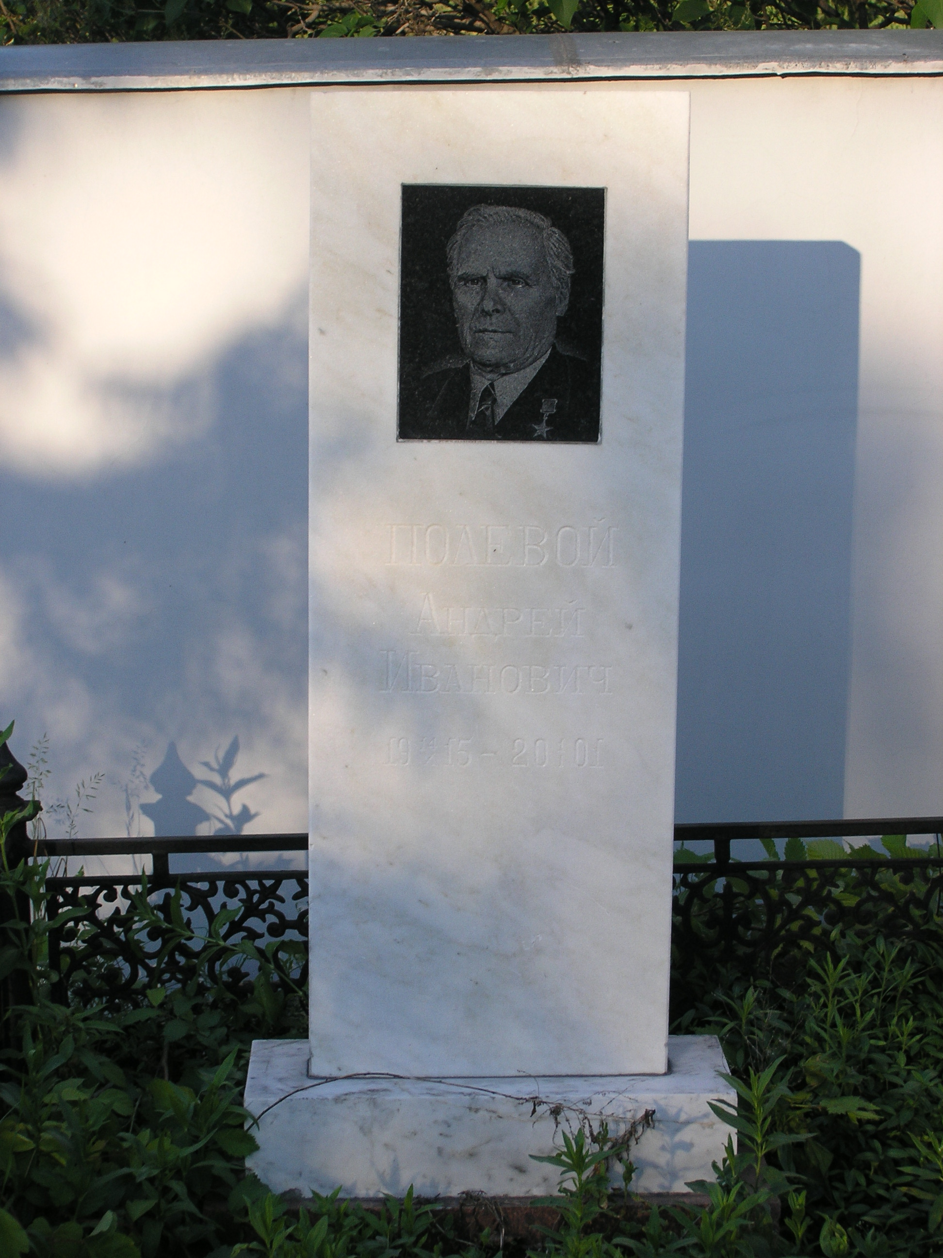 Могила Андрея Ивановича Полевого, Героя Социалистического Труда, Баныкинское кладбище, Тольятти, Россия